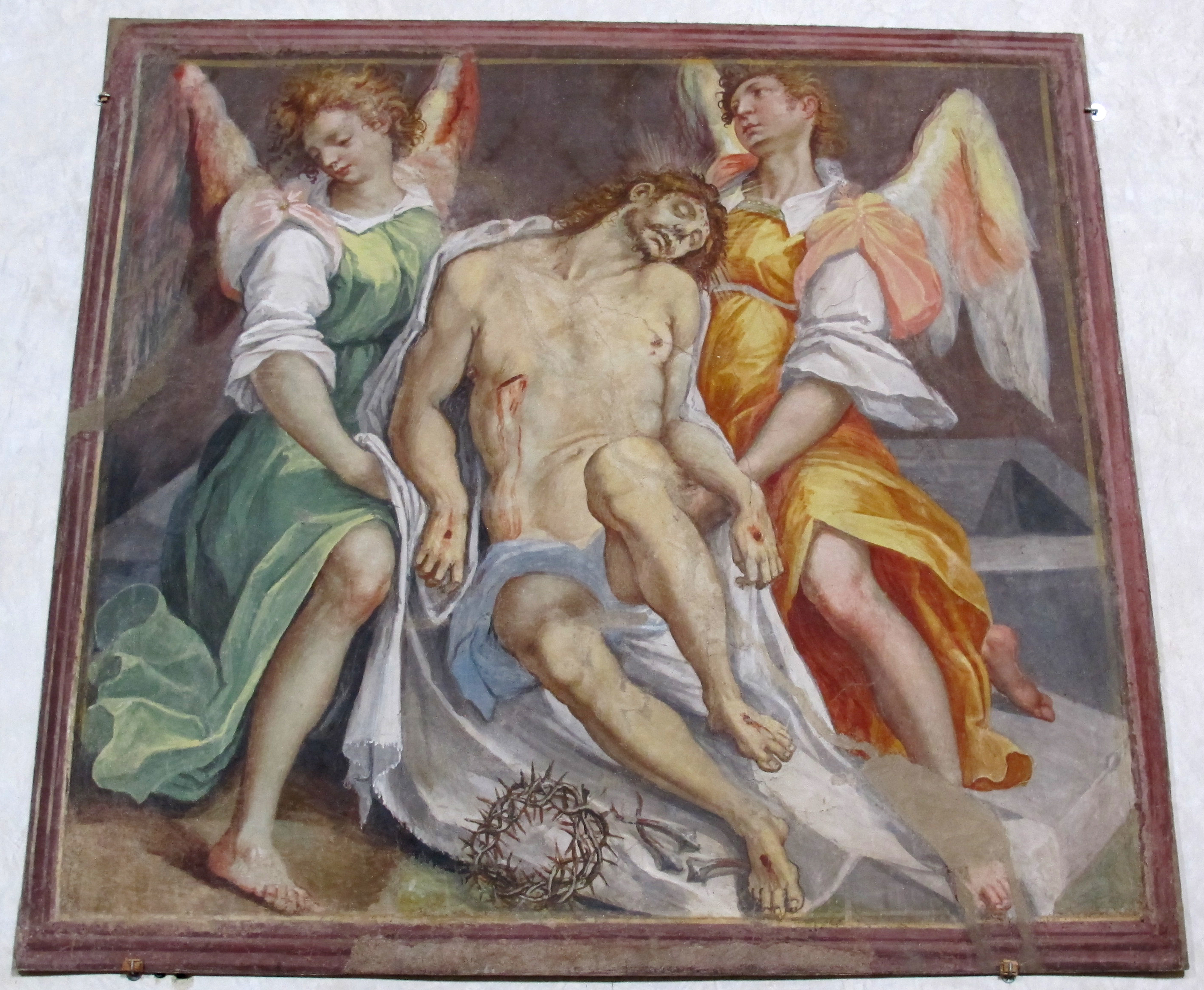 San Bartolomeo a Monte Oliveto - Firenze